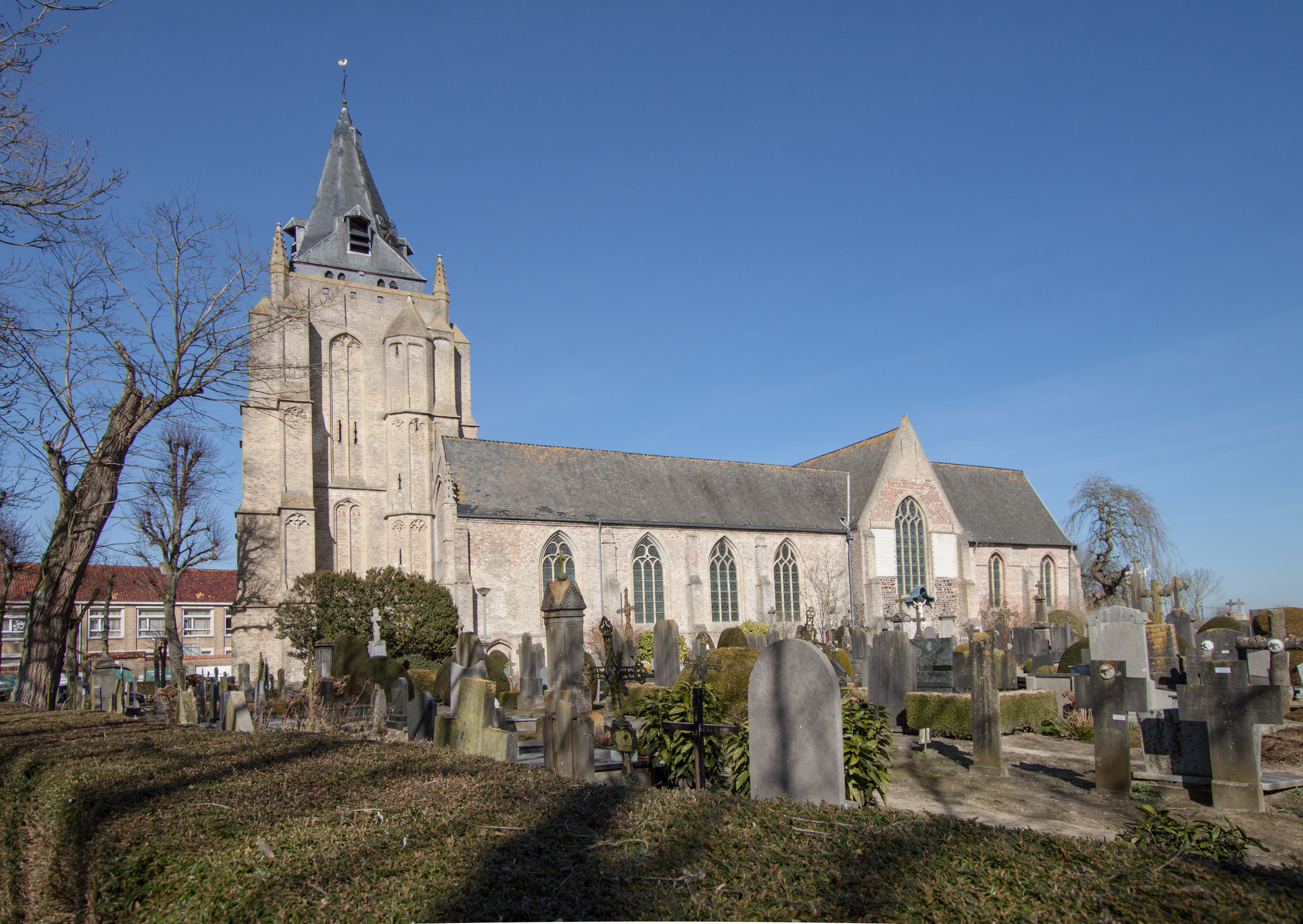 Houtem Churchyard